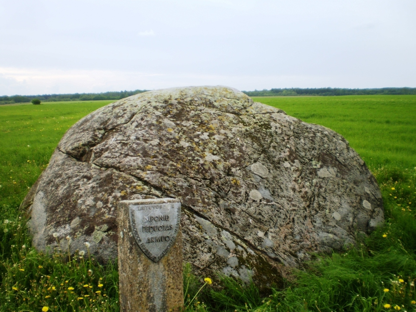 Dubeniuotasis akmuo, Siponiai, Kėdainių raj.